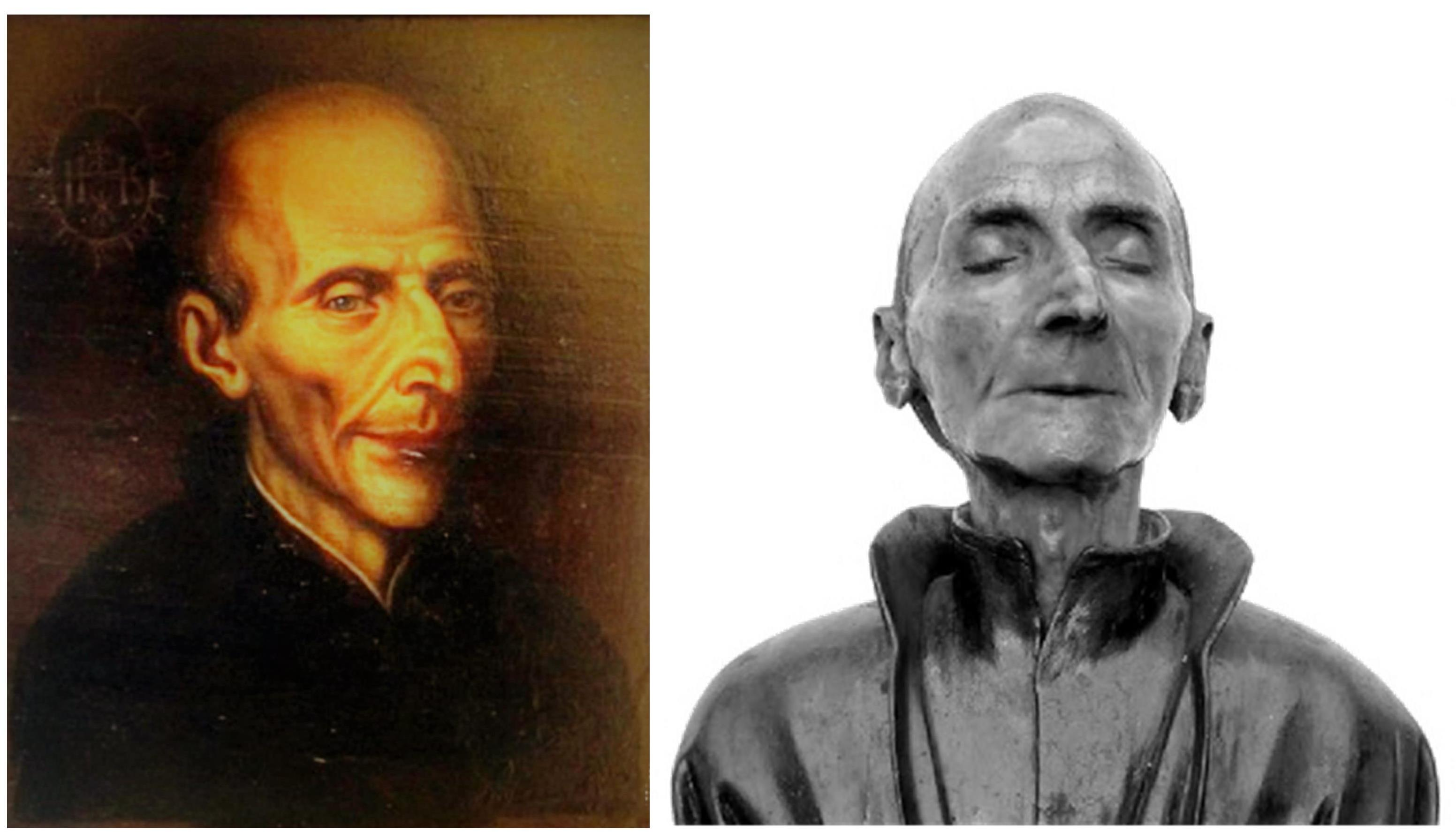 Ritratto e vero volto in cera del santo